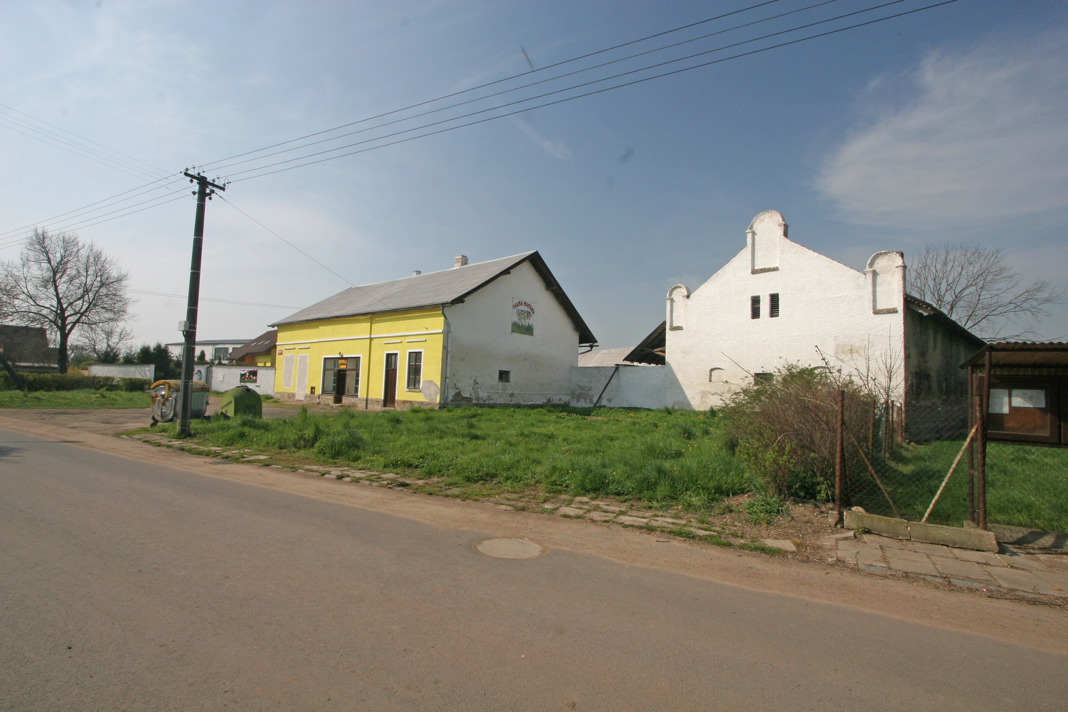 Barchov farma Matějka